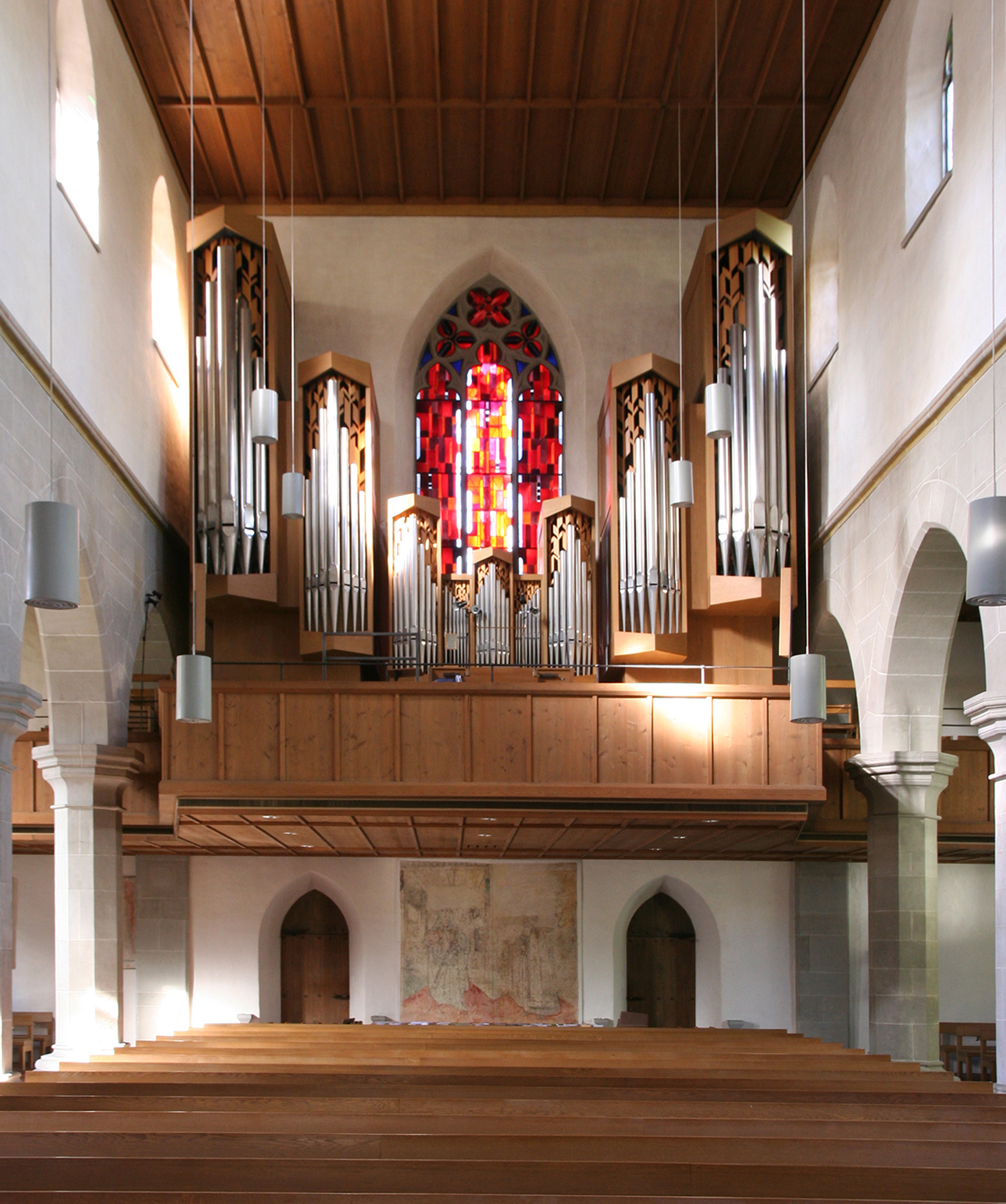 röm.-kath. Pfarrkirche St. Pelagius Bischofszell